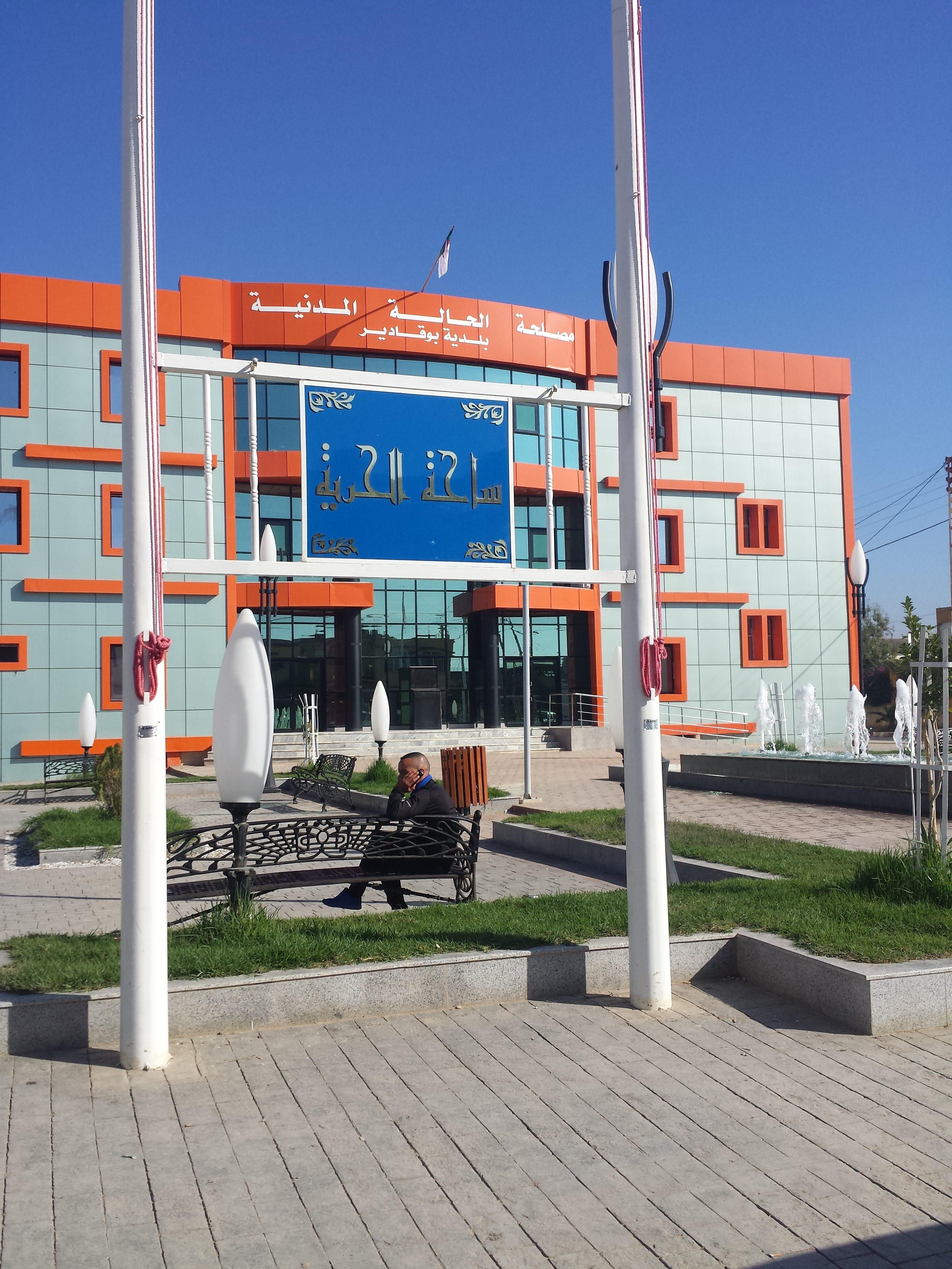 Boukadir centre